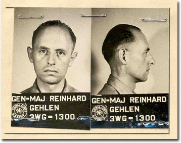 Reinhard Gehlen (* 3. April 1902; † 8. Juni 1979) war General der Wehrmacht, Leiter der Organisation Gehlen und erster Präsident des deutschen Bundesnachrichtendienstes (BND)